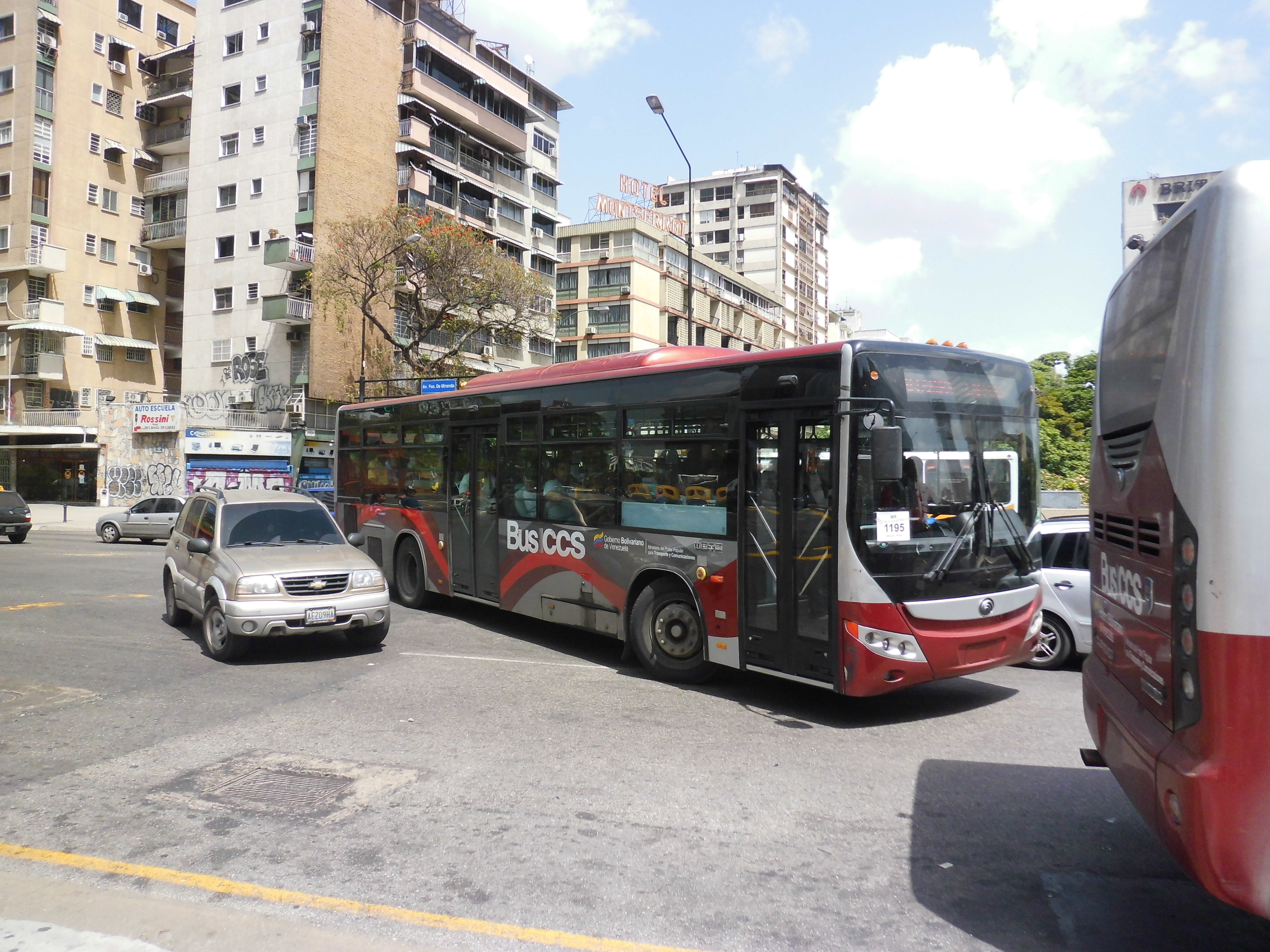 Sistema de transporte BusCaracas en avenida Francisco de Miranda, a nivel de plaza Francia, municipio Chacao, estado Miranda - Venezuela